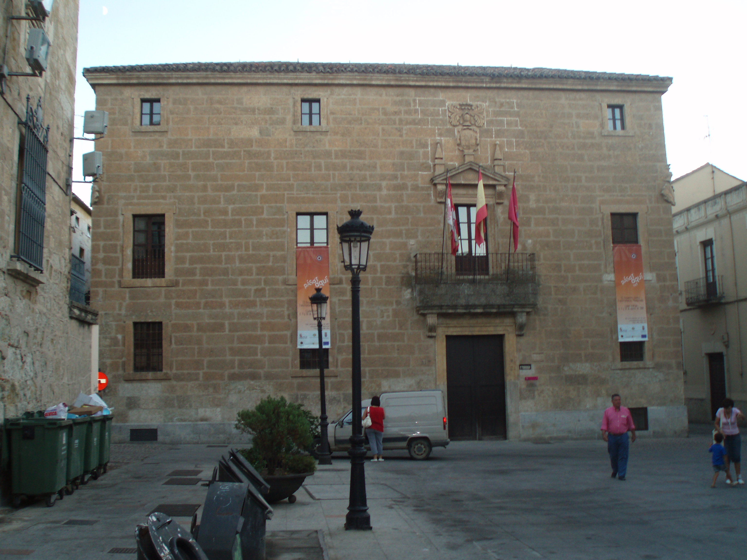 Palacio de Moctezuma, en Ciudad Rodrigo. (Salamanca).